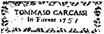 Signature Tommaso Carcassi - 1751